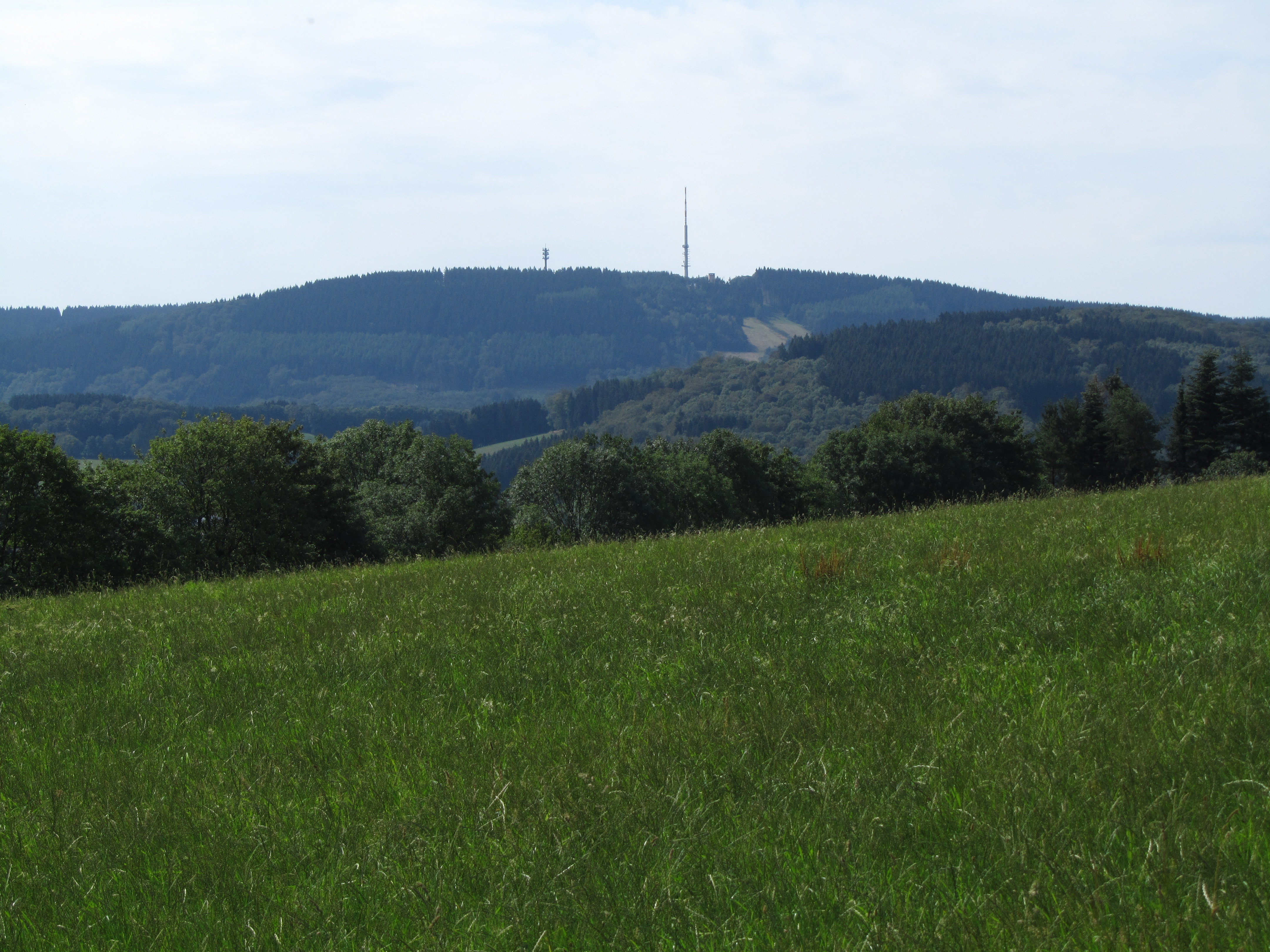 Nordhelle (663 m)im Ebbegebirge von Norden, gesehen von Wellin, einem Weiler nordöstlich von Herscheid im Märkischen Kreis, Sauerland, Nordrhein-Westfalen, Deutschland